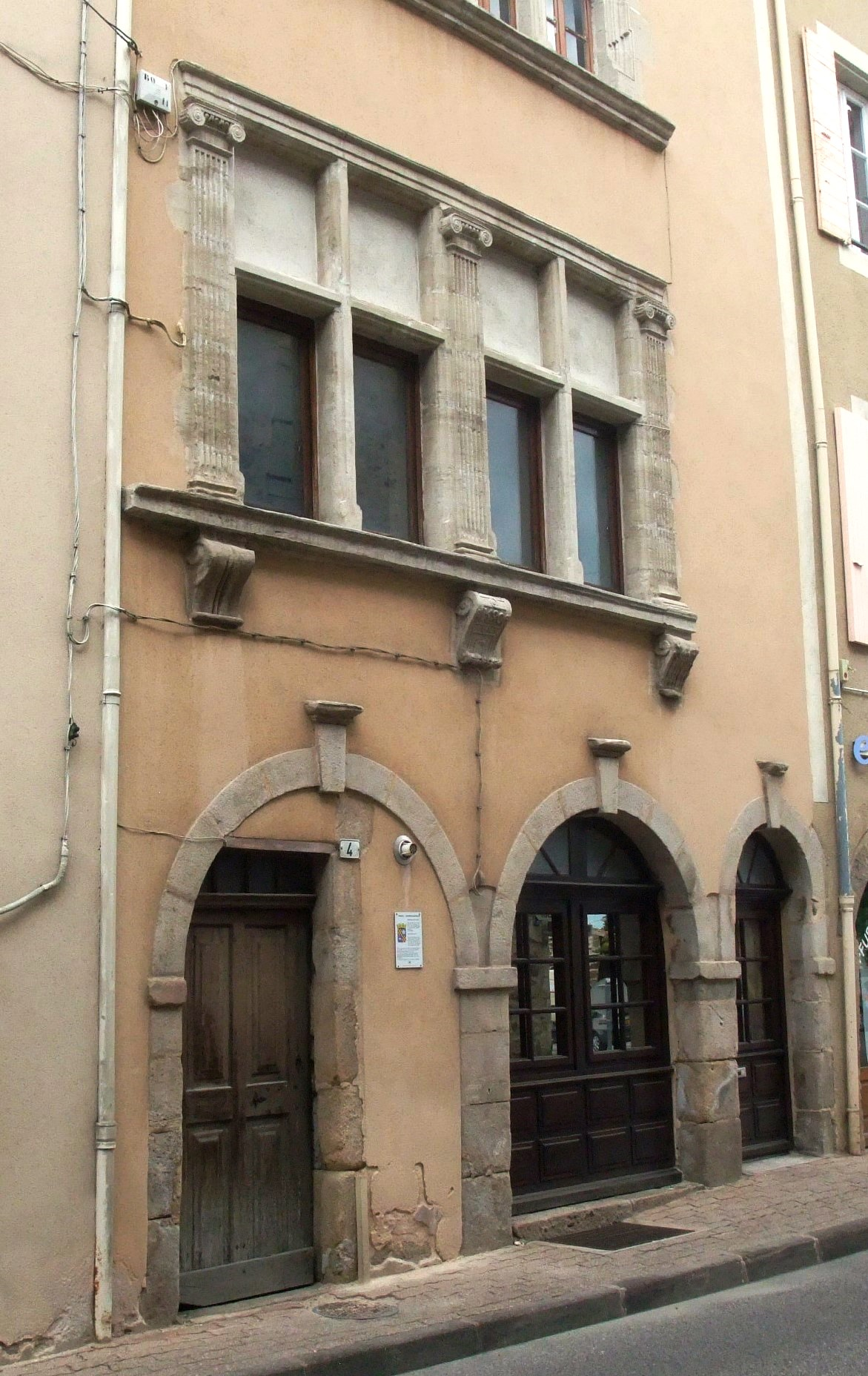 Boulieu maison Renaissance